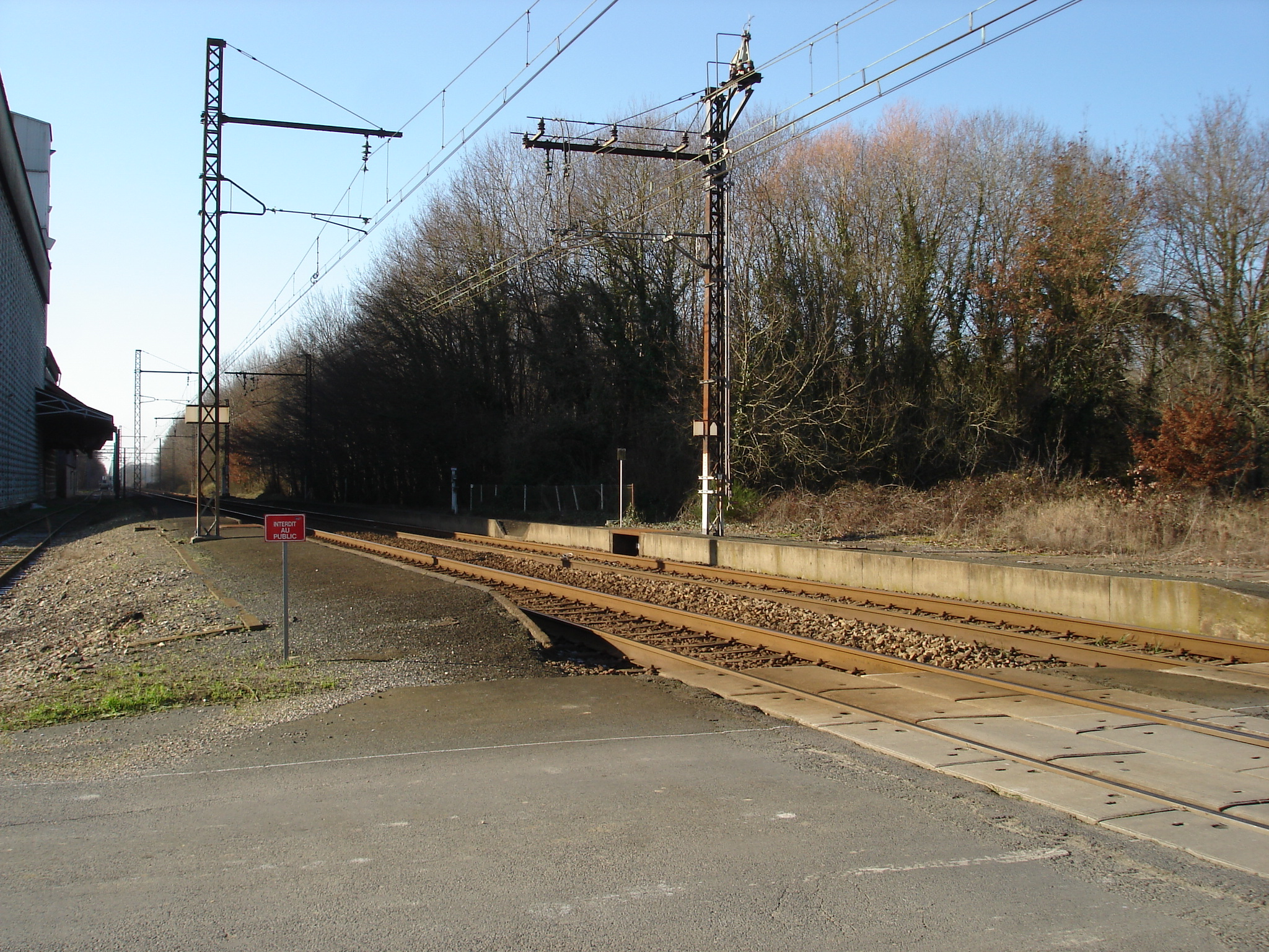 Gare de Montierchaume (36) : Vue générale de la gare.